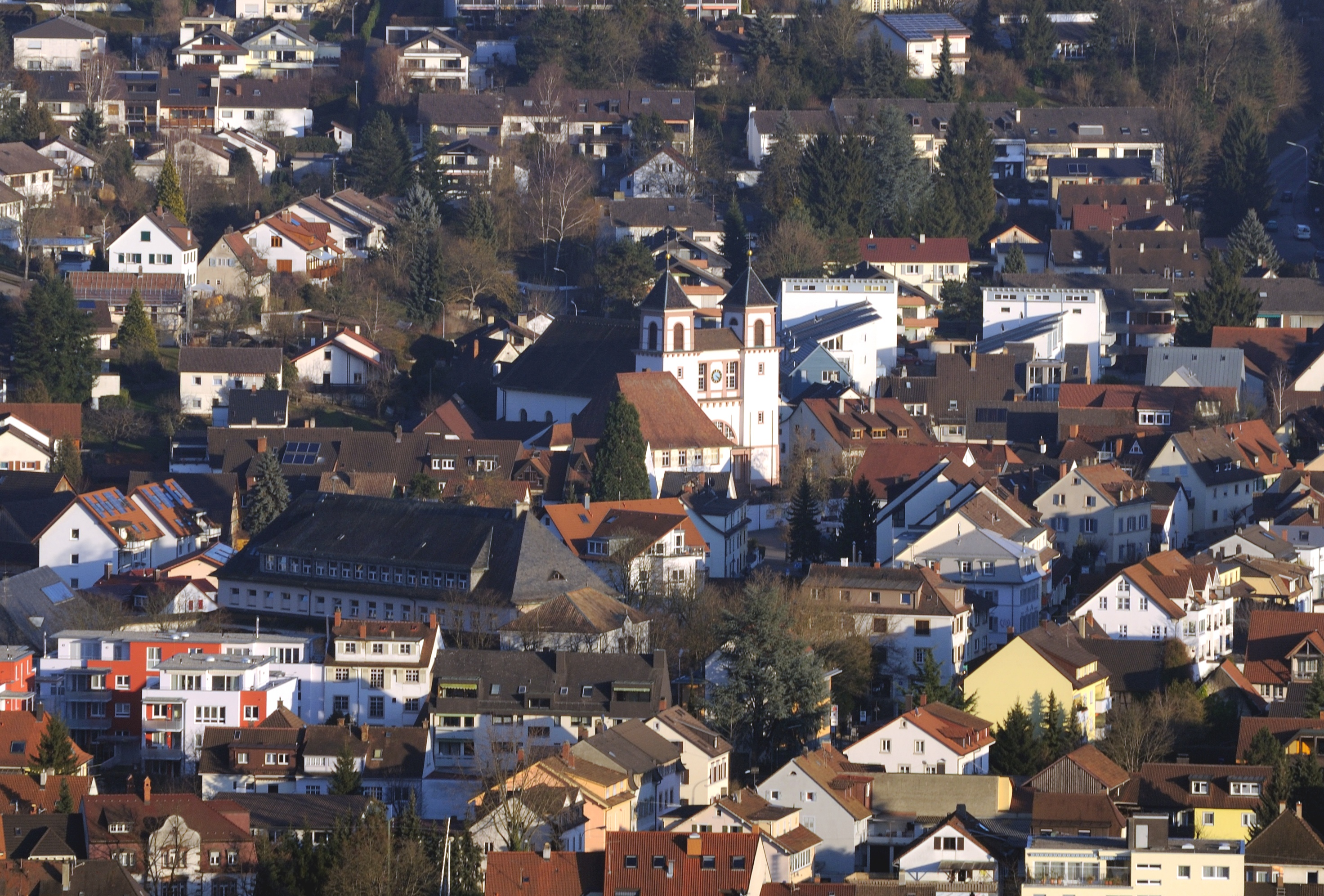 Fridolinskirche in Lörrach-Stetten vom Tüllinger Berg aus gesehen